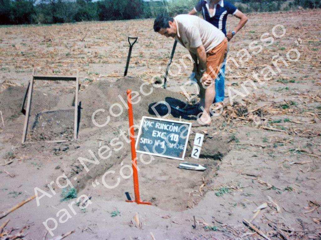 Livio Incatasciato 04 Tabares RioII-1982-P